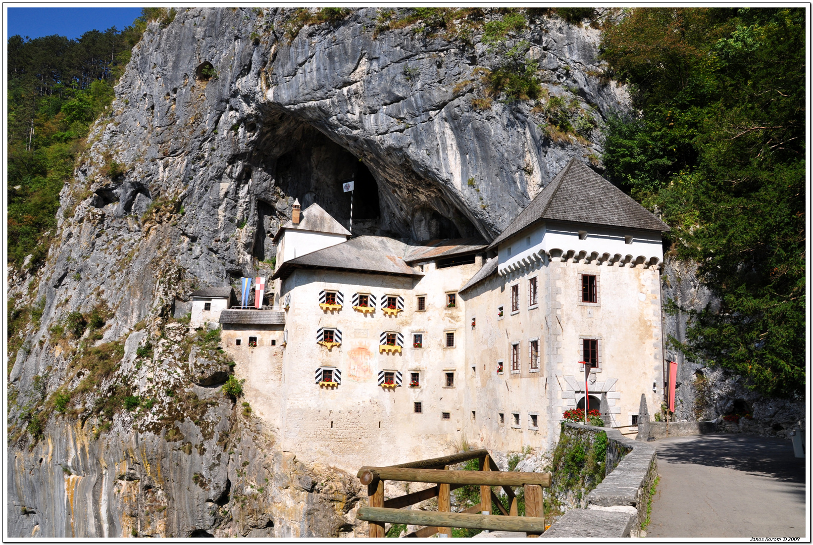 Predjamski Grad (4)